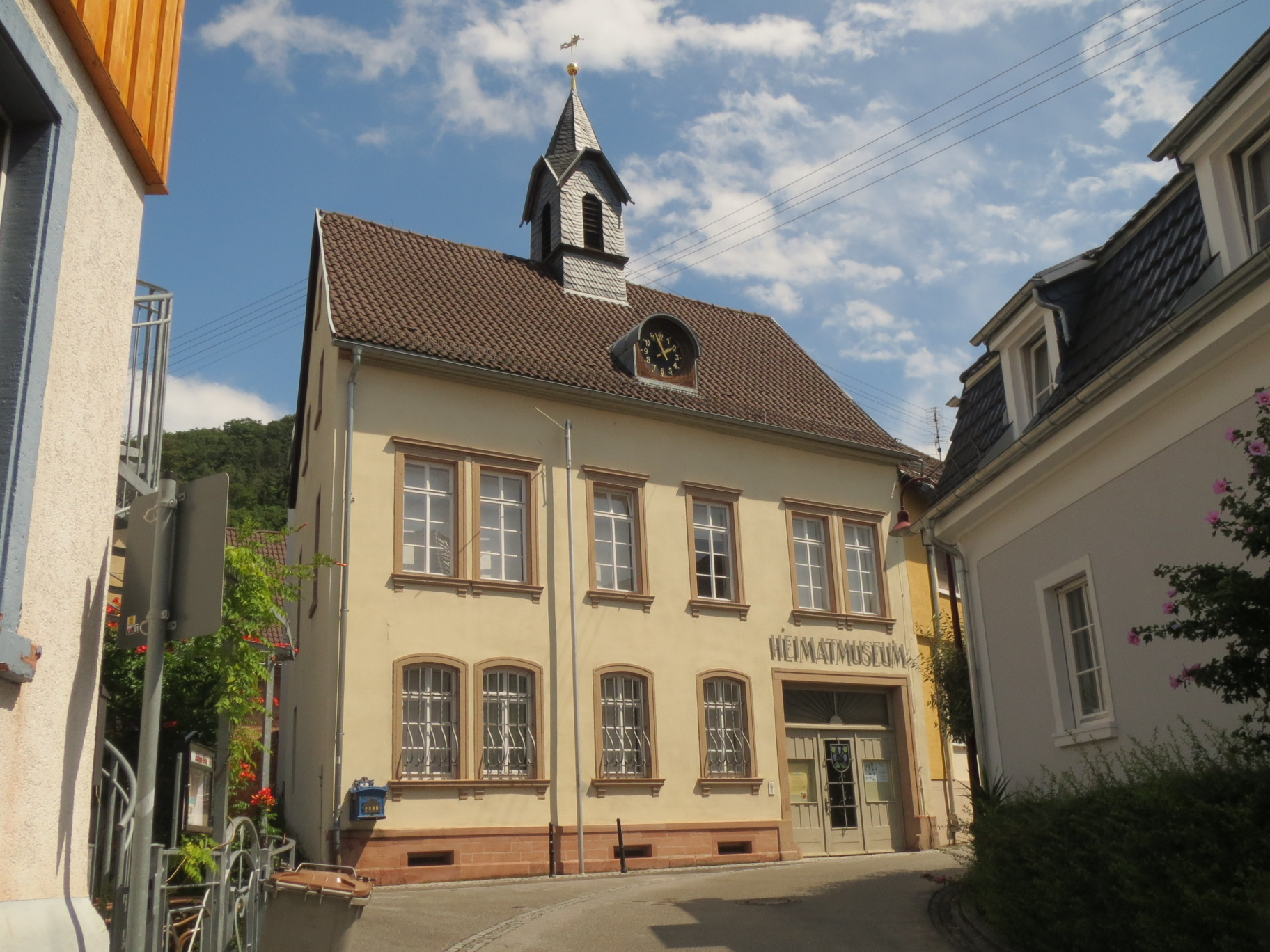 Das alte Rathaus von Dossenheim in der Rathausstraße. (von 1894-1955) Heute Heimatmuseum